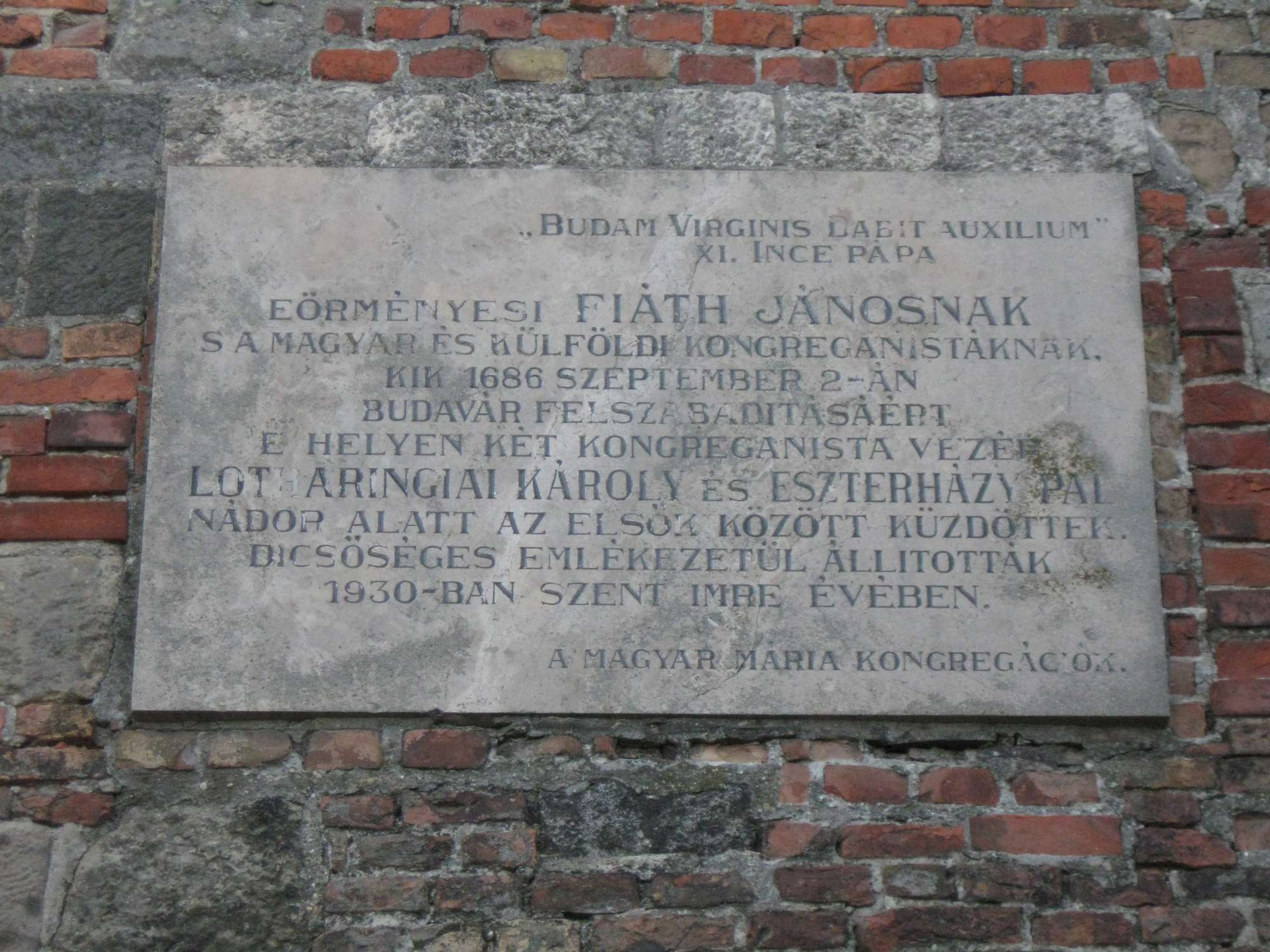 Budavár 1686-os visszafoglalásának egyik emléktáblája, Eörményesi Fiáth János emlékére. Budapest, I. ker. Anjou-bástya / Lovas út. Felirata: „»Budam Virginis Labit Auxilium« XI. Ince Pápa Eörményesi Fiáth Jánosnak s a magyar és külföldi kongreganistáknak, kik 1686 szeptember 2-án Budavár felszabadításáért e helyen két, kongreganista vezér[,] Lotharingiai Károly és Eszterházi Pál nádor alatt az elsők között küzdöttek. Dicsőséges emlékezetül állították 1930-ban, Szent Imre évében. A magyar Mária kongregációk.”